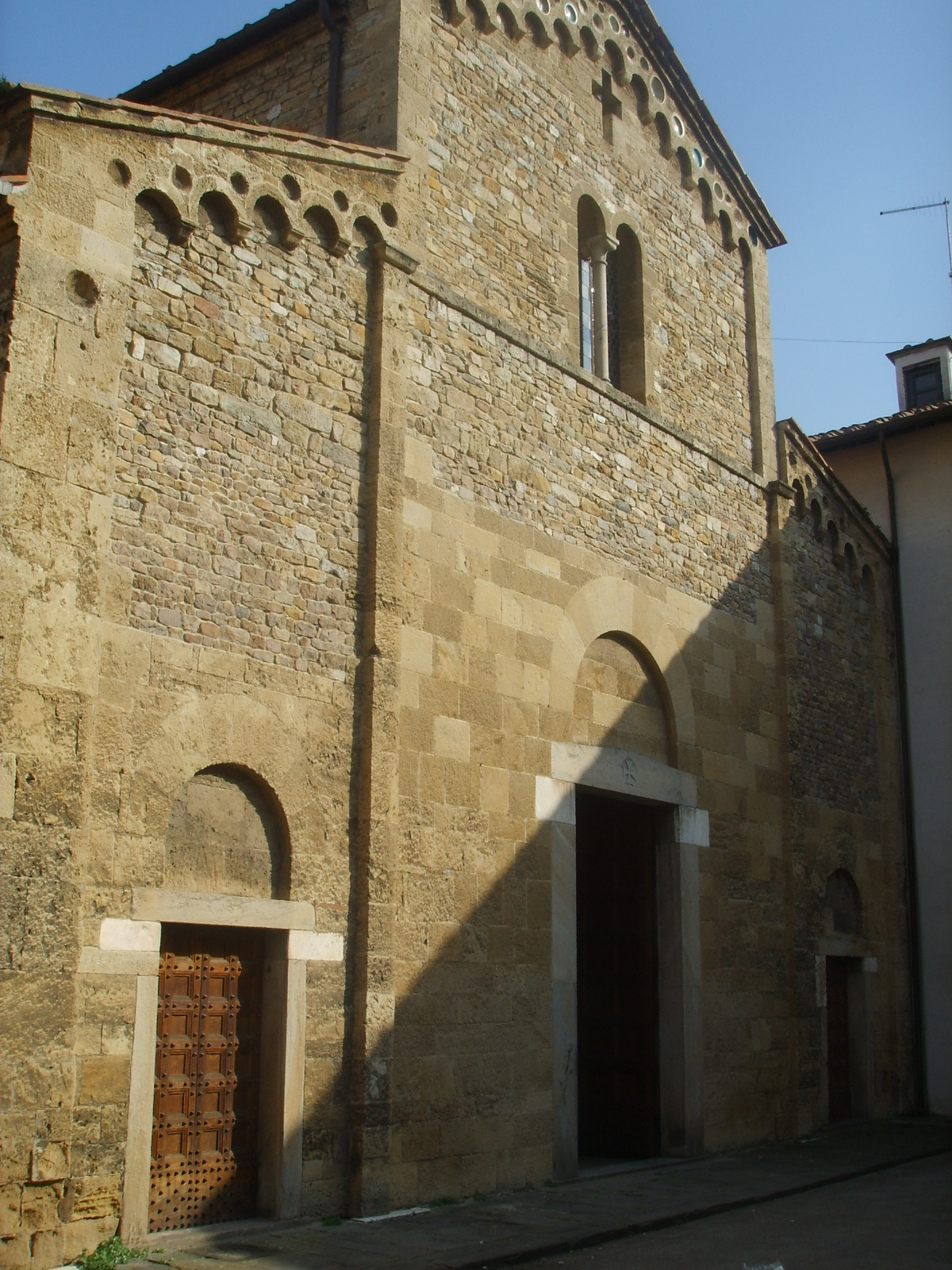 Chiesa_di_san_sisto,_pisa